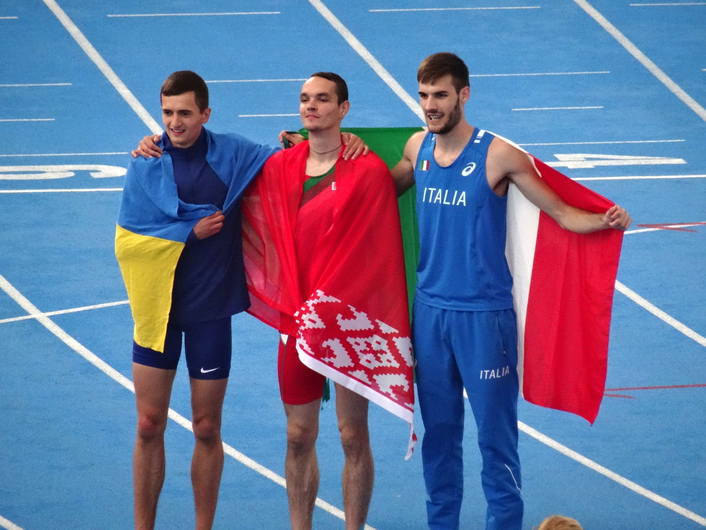 Młodzieżowe Mistrzostwa Europy w Lekkoatletyce U23 w Bydgoszczy 13-16 lipca 2017, bieg na 5000 m mężczyzn